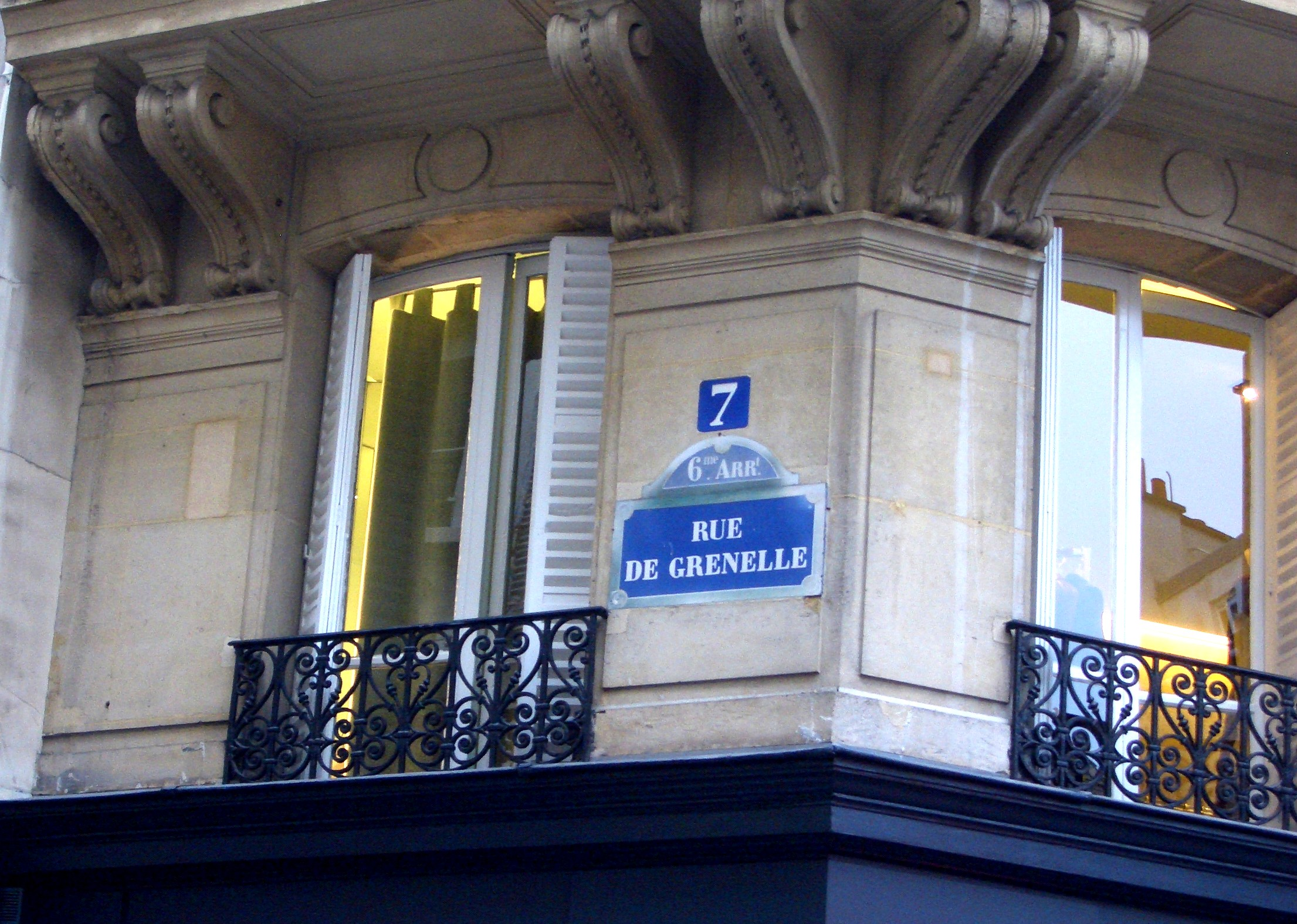 Il numero 7 di Rue de Grenelle dov'è ambientato il romanzo L'eleganza del riccio di Muriel Barbery - Parigi